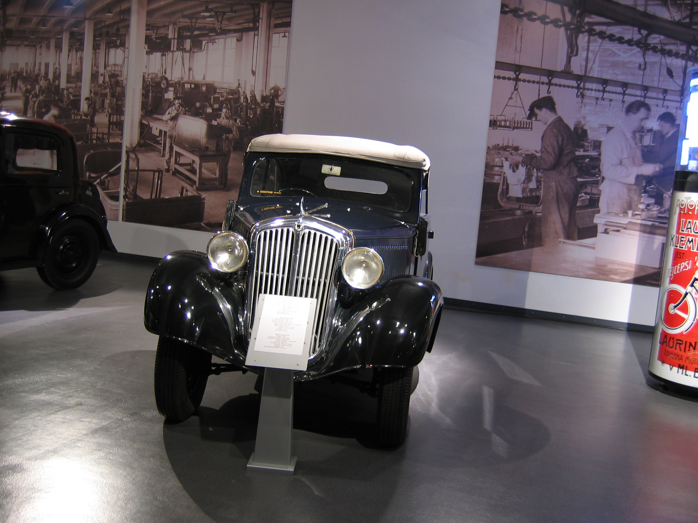 Škoda 420 Popular - Škoda Auto Museum, Mlada Boleslav